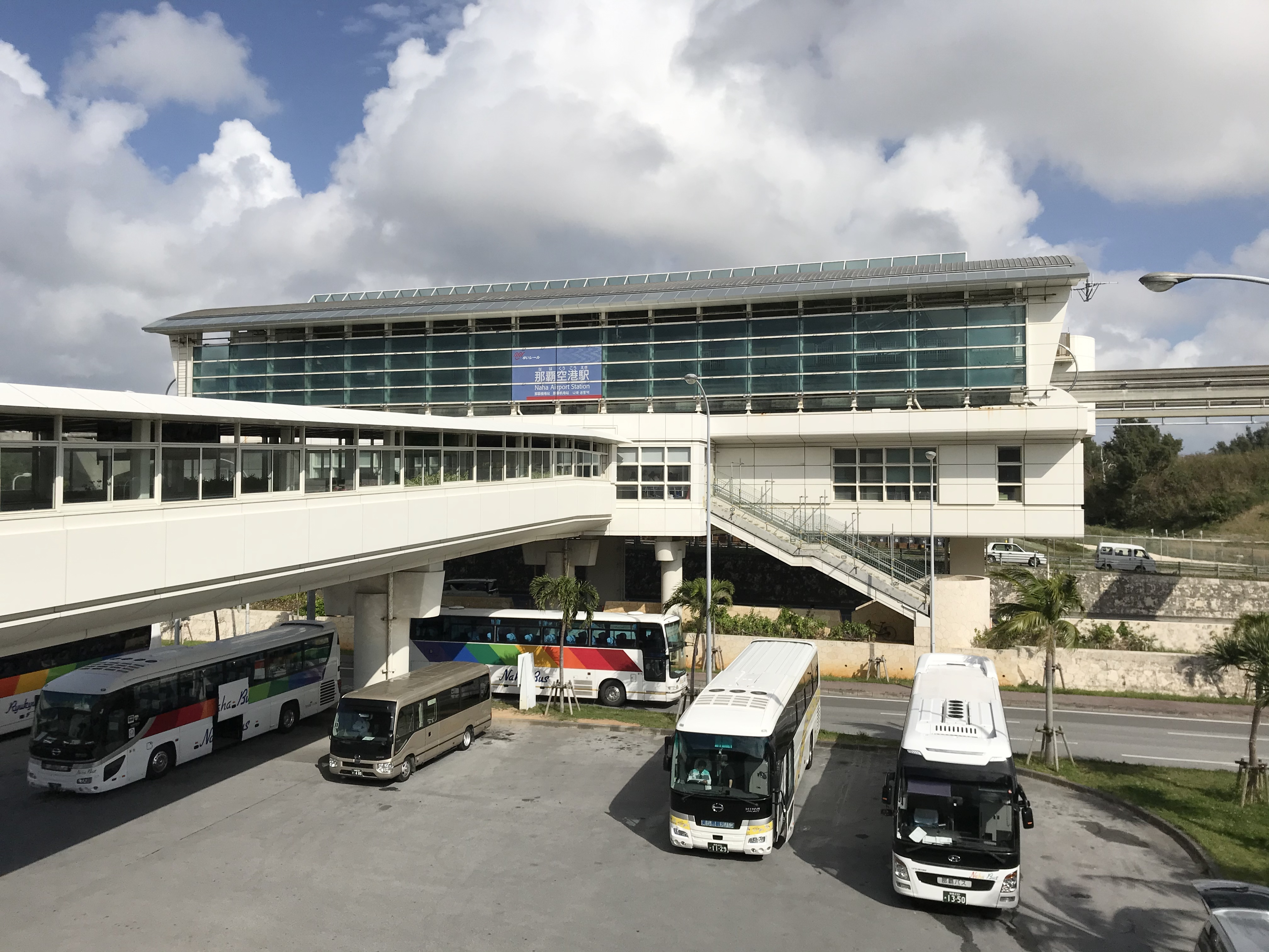 沖縄都市モノレール（ゆいレール）那覇空港駅駅舎